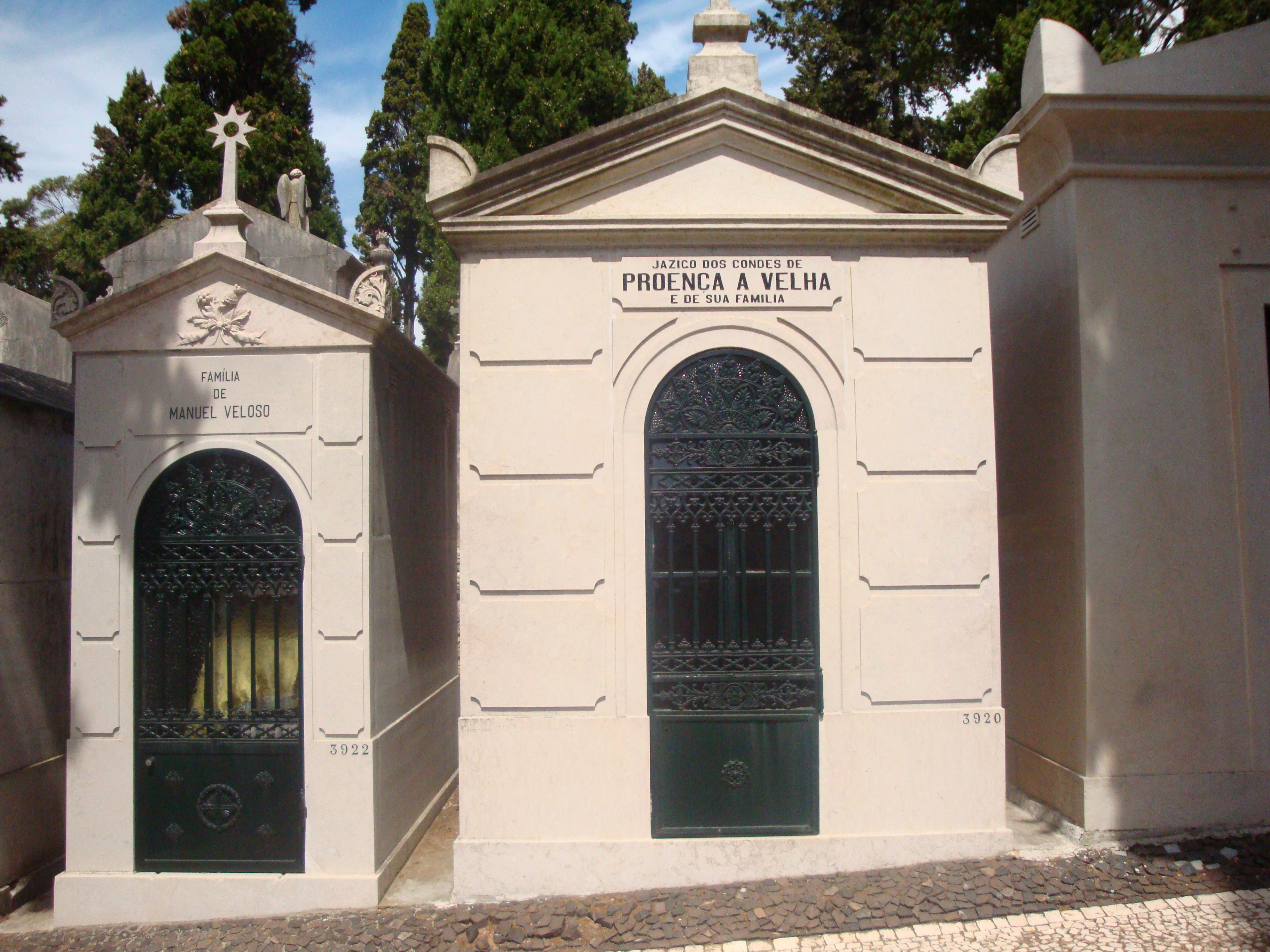 Jazigo dos condes de Proença-a-Velha e sua família; Cemitério dos Prazeres; Lisboa